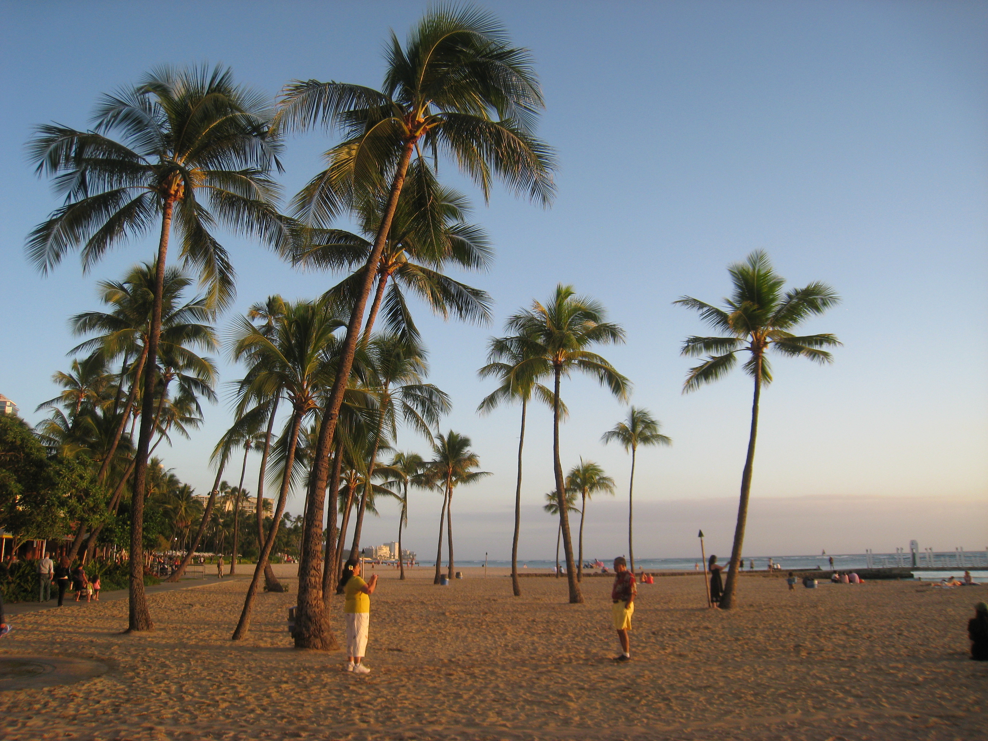 Waikiki Beach, Honolulu, Hawaii, USA.